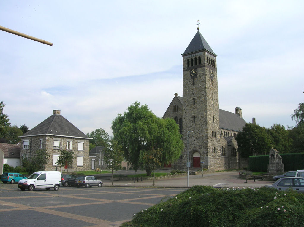 Nieuwe kerk te Limbricht (architect Jos Cuypers)